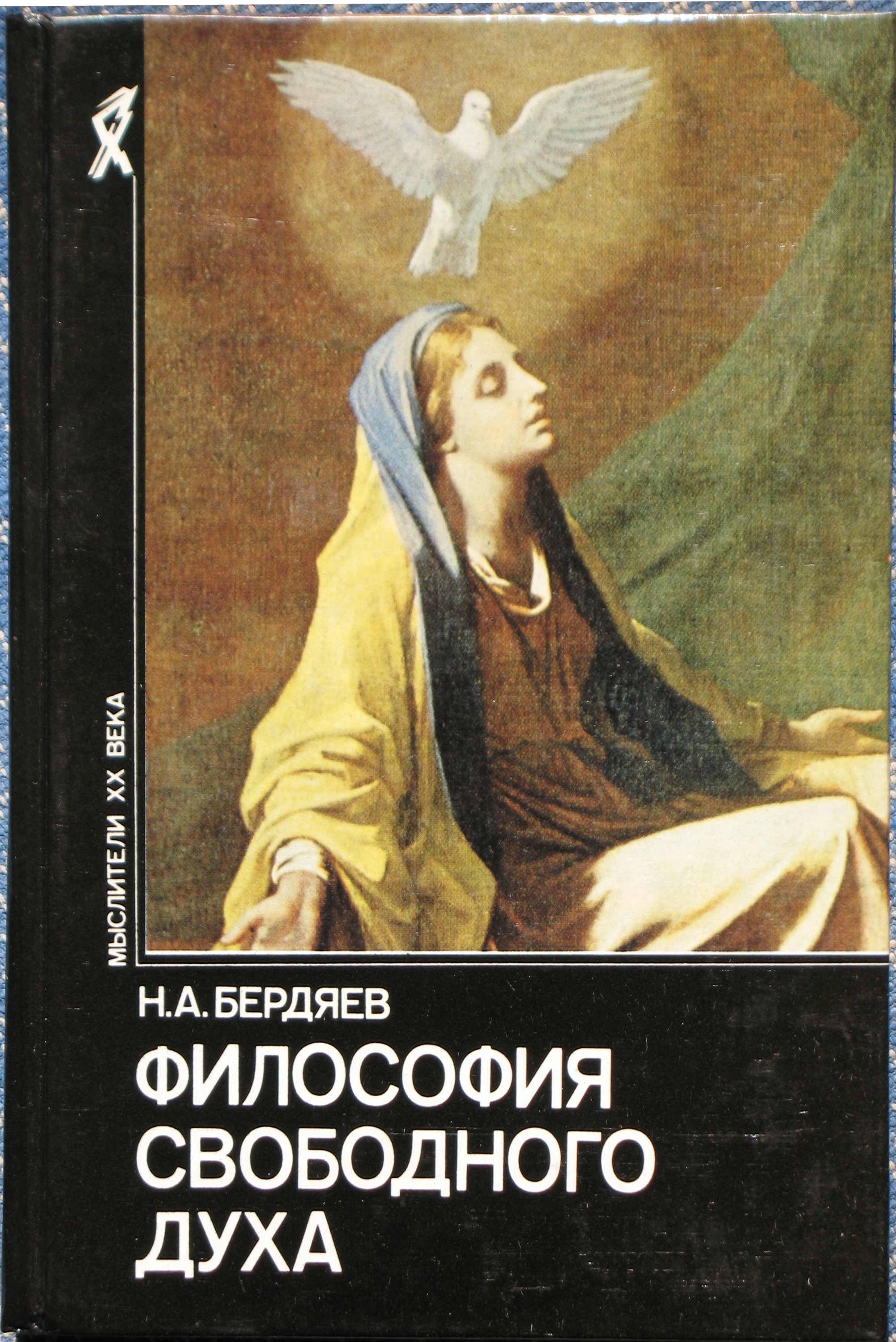 Nikolai Berdjaev book. Серия "Мыслители XX века". Бердяев Николай, Философия свободного духа. Москва, изд. "Республика", 1994, тираж 25 000, 480 стр. Обложка - Никола Пуссен, "Благовещение".